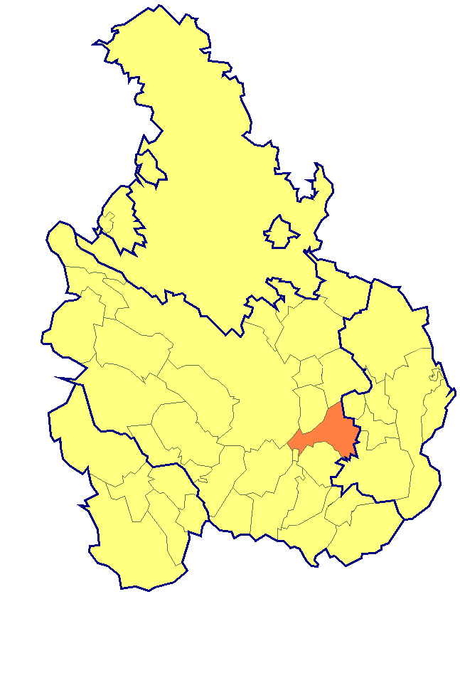 Hranice Prusy_-_Boškůvky (Vyškov- czech republic)